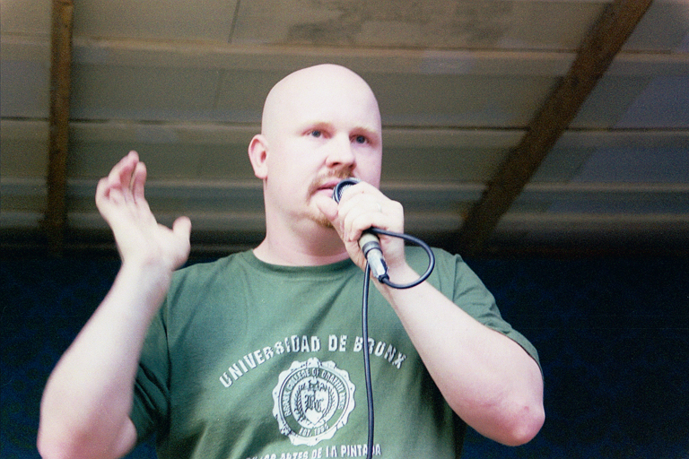 Sere a.k.a. Seremoniamestari a.k.a. Matti Huhta Annikin Tähtimusiikkifestivaaleilla 2004